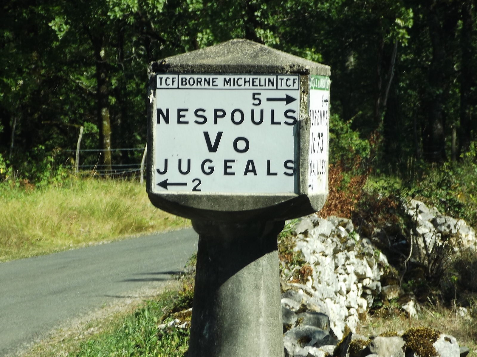 Borne routière Michelin d'intersection à panneau de lave émaillé sur socle cylindrique de béton armé, sponsorisée par le Touring Club de France (TCF), érigée à l'intersection du chemin vicinal ordinaire (Vo) Nespouls - Jugeals-Nazareth et du chemin d'intérêt commun 73 (Ic 73) Turenne - Noailles via La Fage (commune de Noailles). La borne se trouve à l'entrée du hameau Lagleygeolle (commune de Nespouls) à environ 1,5 km au sud-est du gouffre de La Fage (commune de Noailles) en Corrèze, Limousin, France.